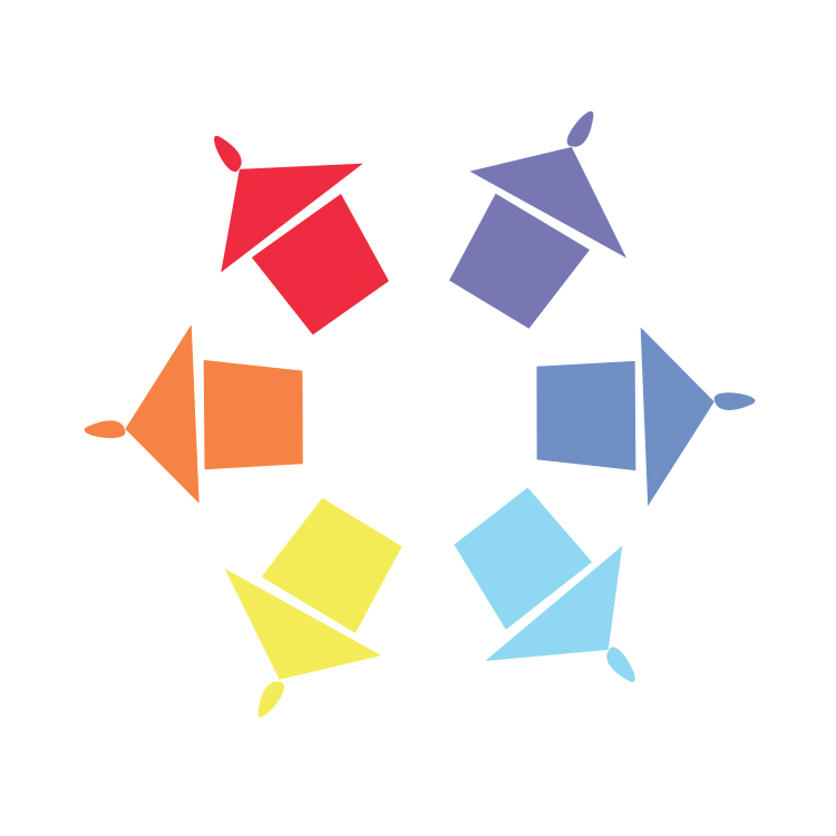 Coreto Todas as Modalidades